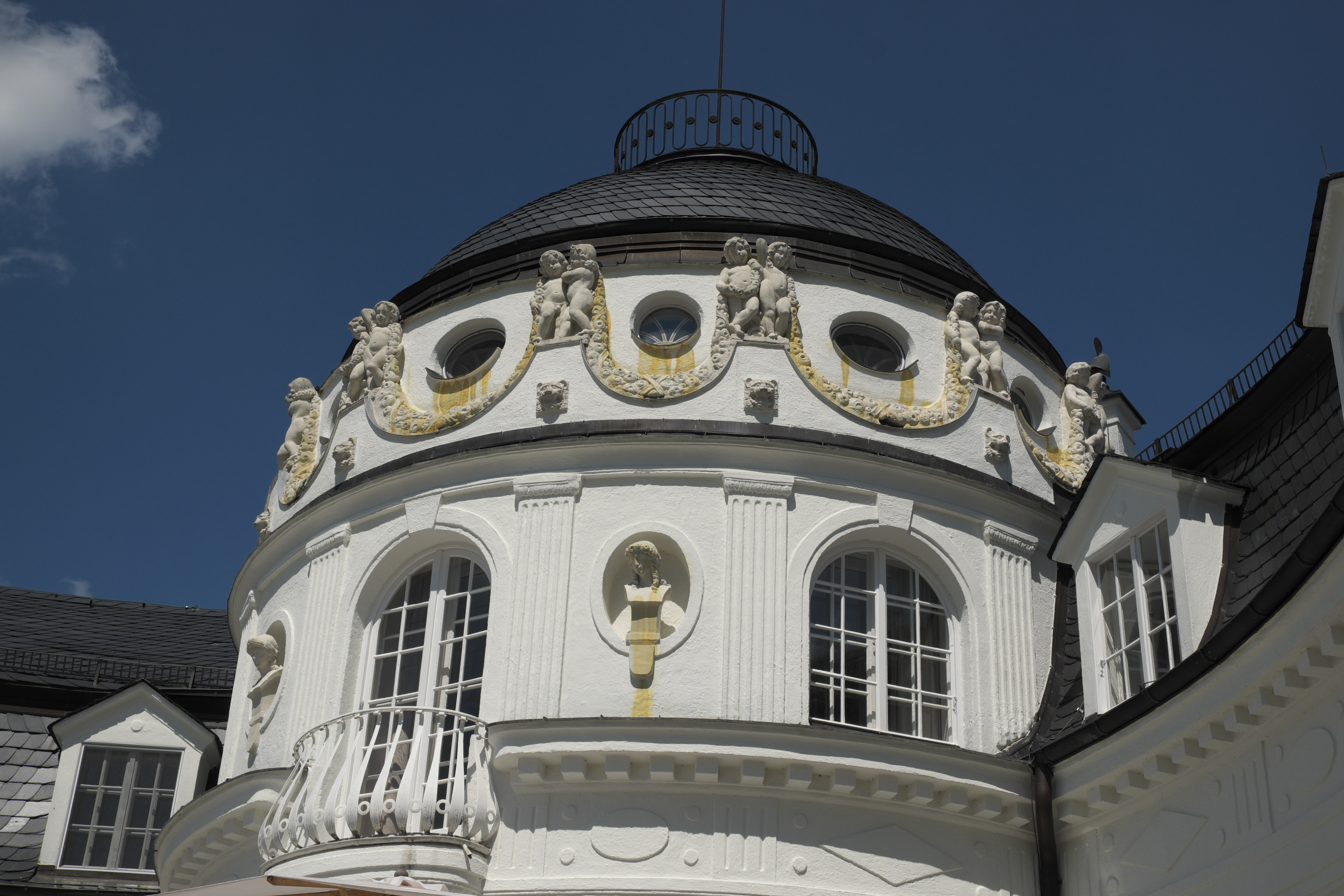 Ehemalige Villa, jetzt Klinik, in Kempfenhausen, einem Ortsteil der Gemeinde Berg im Landkreis Starnberg (Bayern/Deutschland)